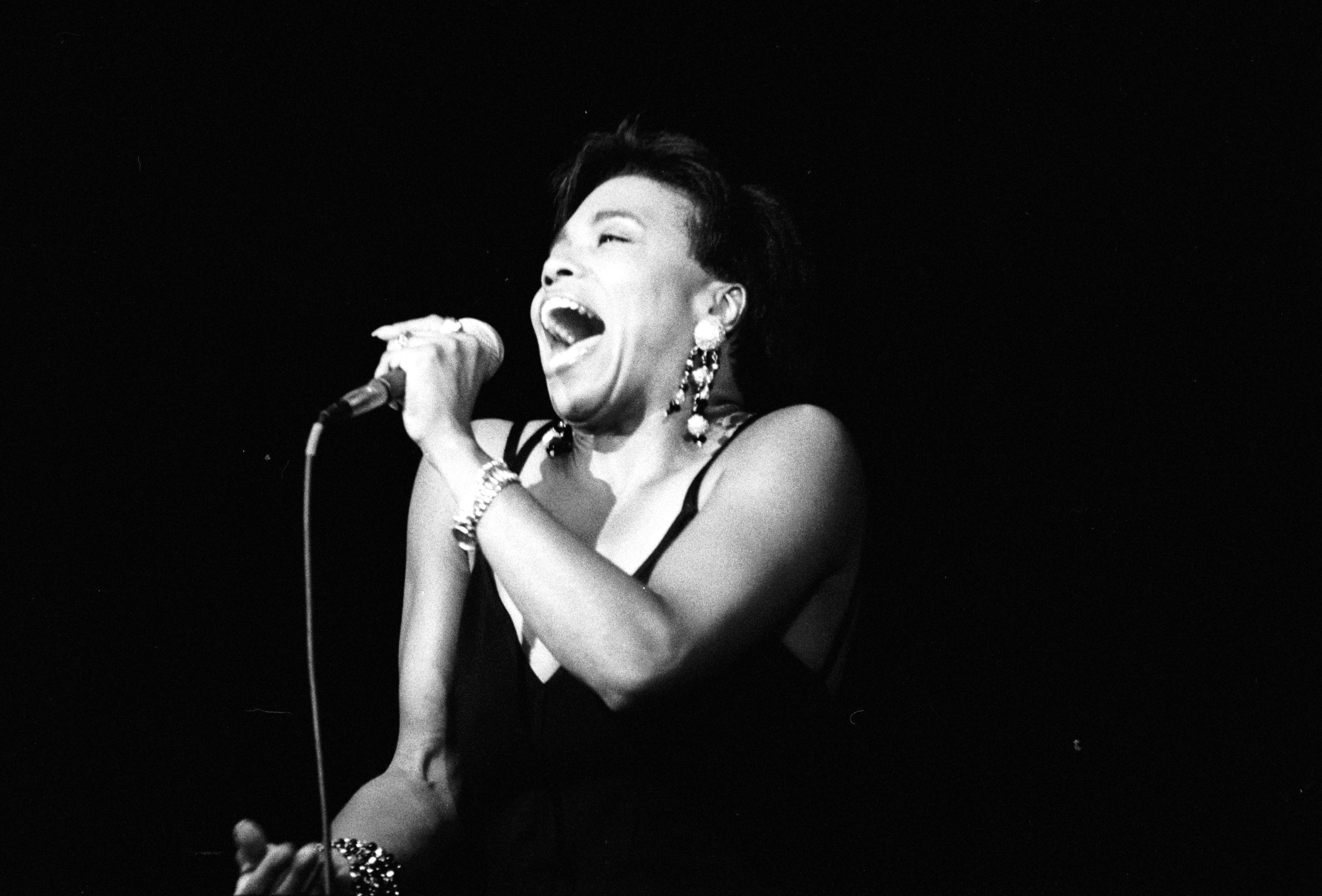 La chanteuse de jazz Dee Dee Bridgewater en concert en 1990 à Deauville, Normandie, France.